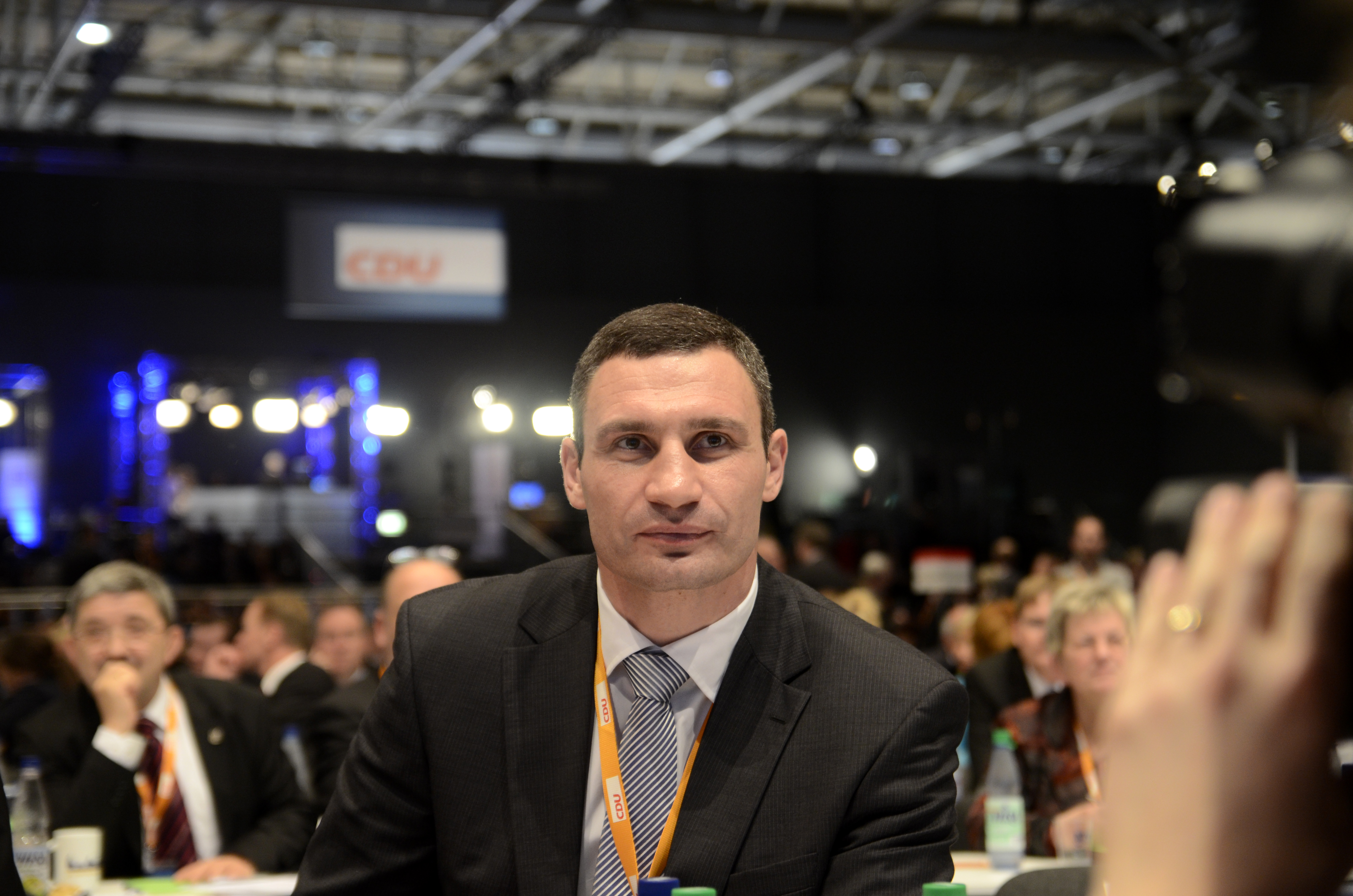 Vitali Klitschko auf dem CDU-Parteitag 2012